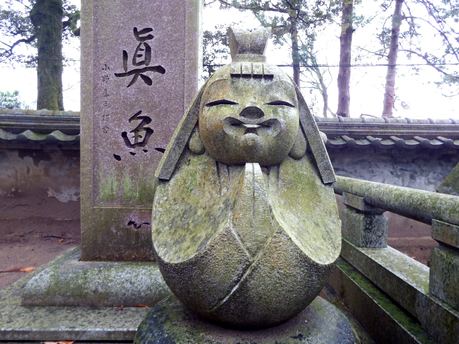 大窪寺の真魚像